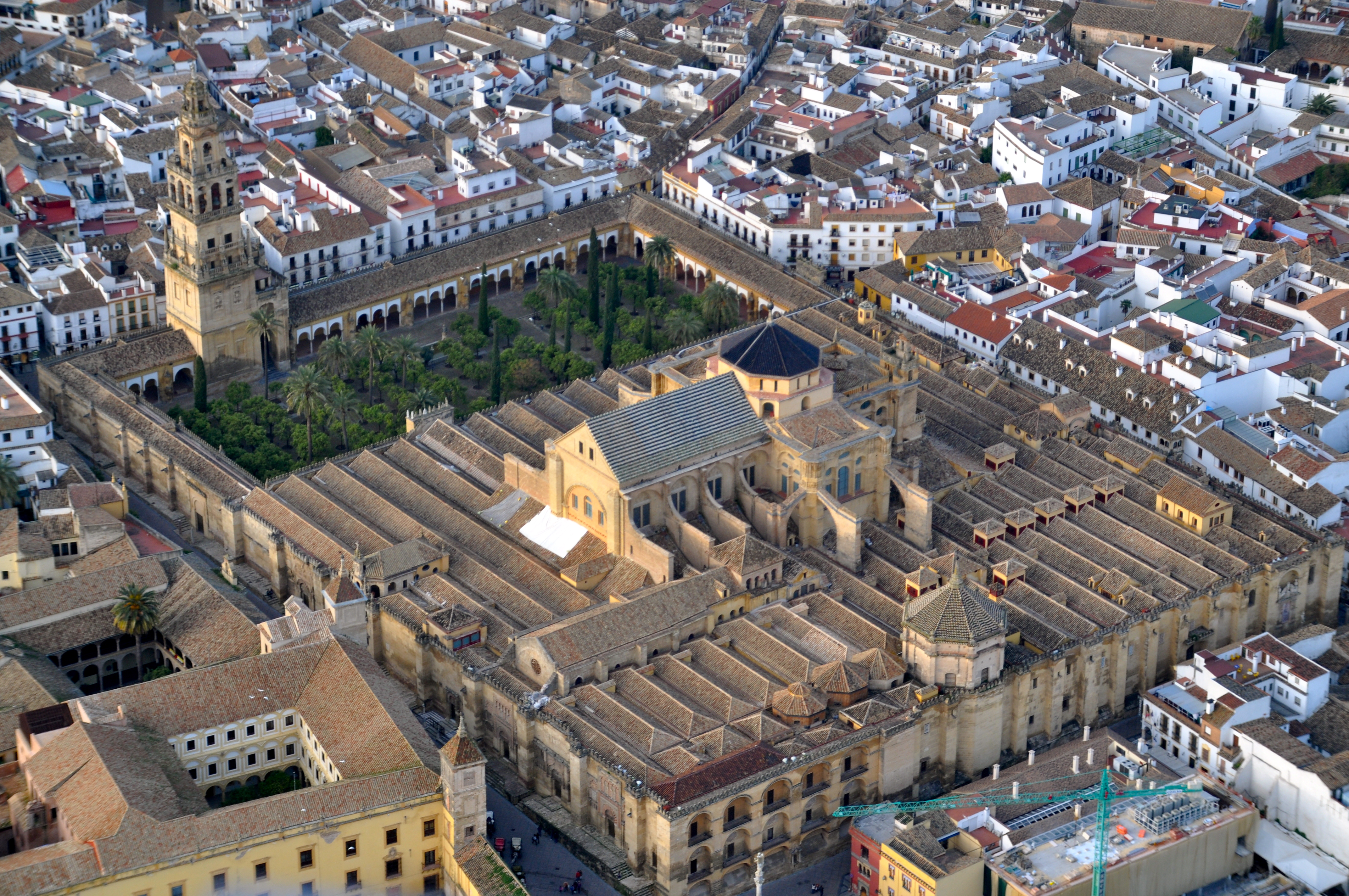 Mezquita de Córdoba desde el aire (Córdoba, España).